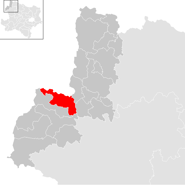 Bezirk Gmünd